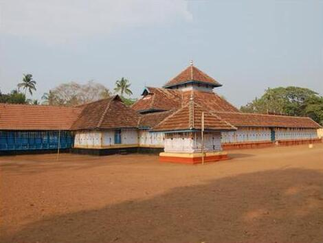 ശൃംഗപുരം ക്ഷേത്രം